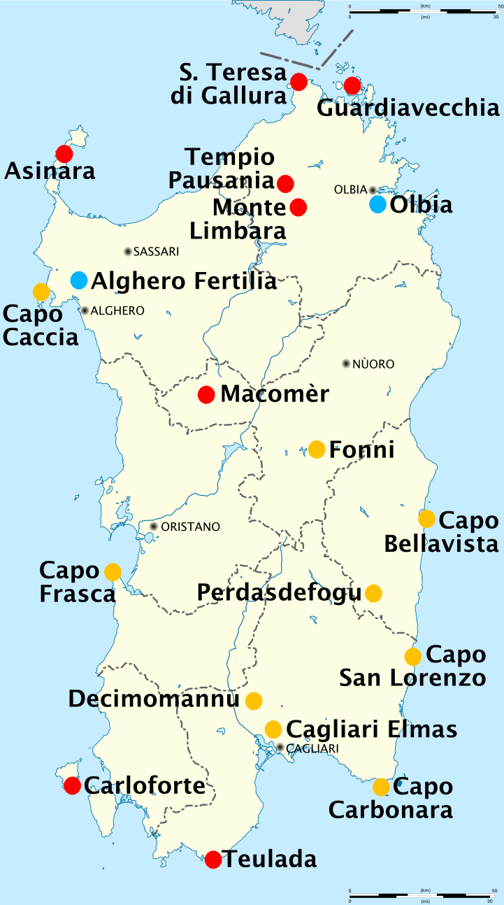 Mappa raffigurante le stazioni meteorologiche della Sardegna, Italia